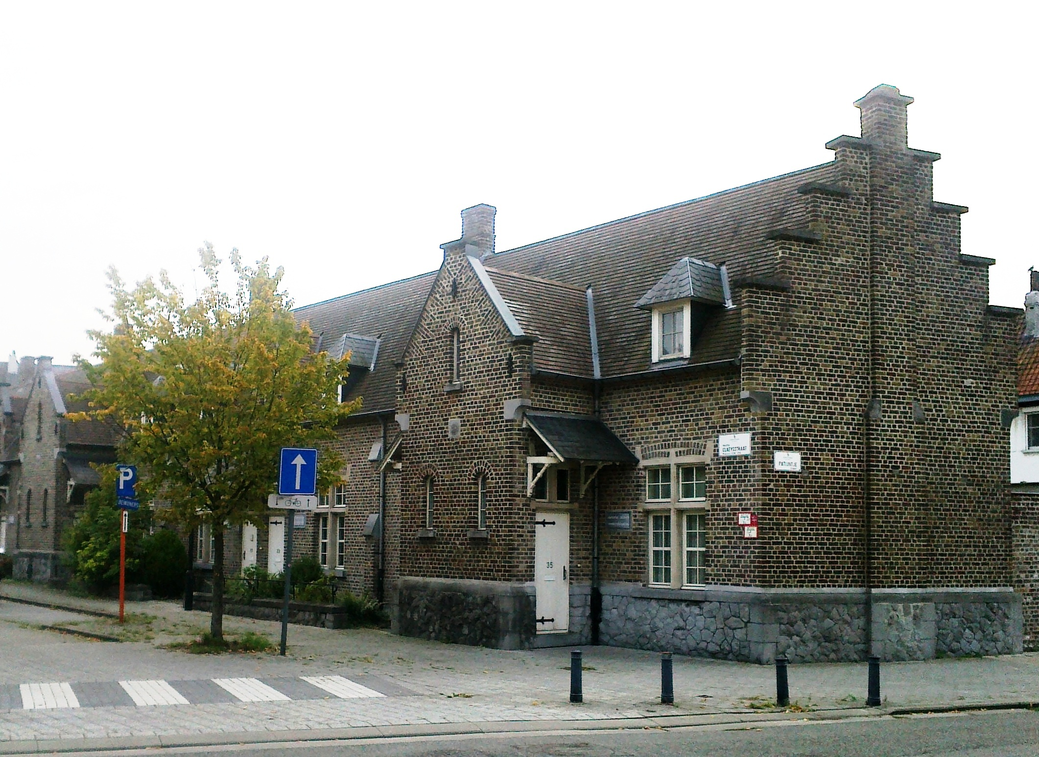 Neogotische huizen van de Prosper Claeysstraat in Gent 27 sept 2017